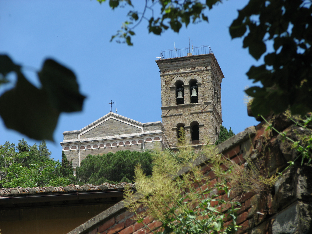 Cortona, Toscana, Italia